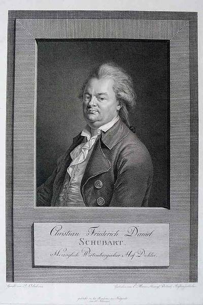 „Christian Friedrich Daniel Schubart. Herzoglich Wirtembergischer Hof Dichter“. In der Platte signiert: „Gemalt von F. Oelenhainz. Gestochen [1791] von E. Morace, Herzogl. Wirtembg. Hofkupferstecher. / Gedrukt(!) in der Academie zu Stutgardt / von H. Schweizer.“